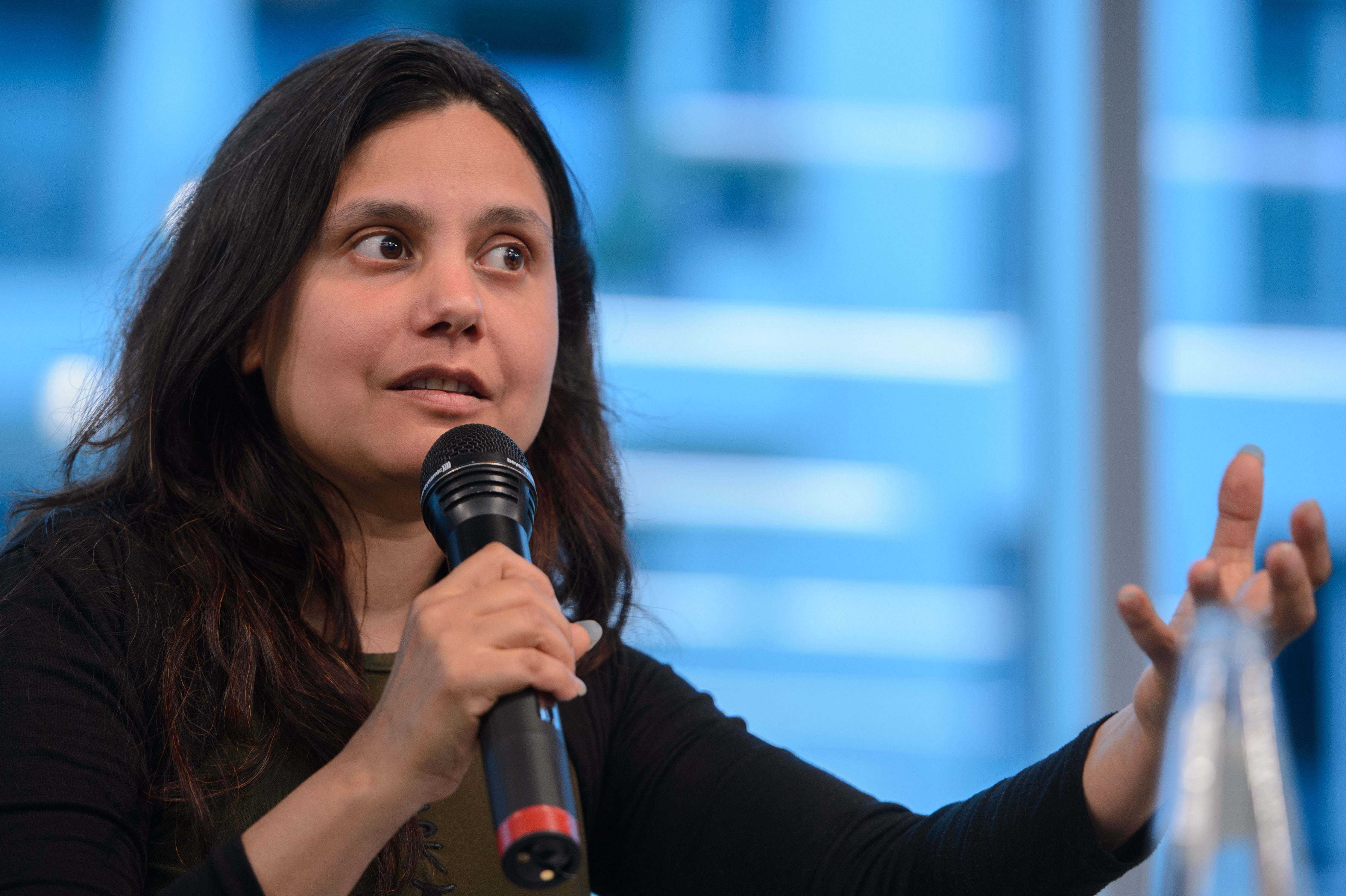 Mithu Sanyal (Kulturwissenschaftlerin, Journalistin, Autorin), Foto